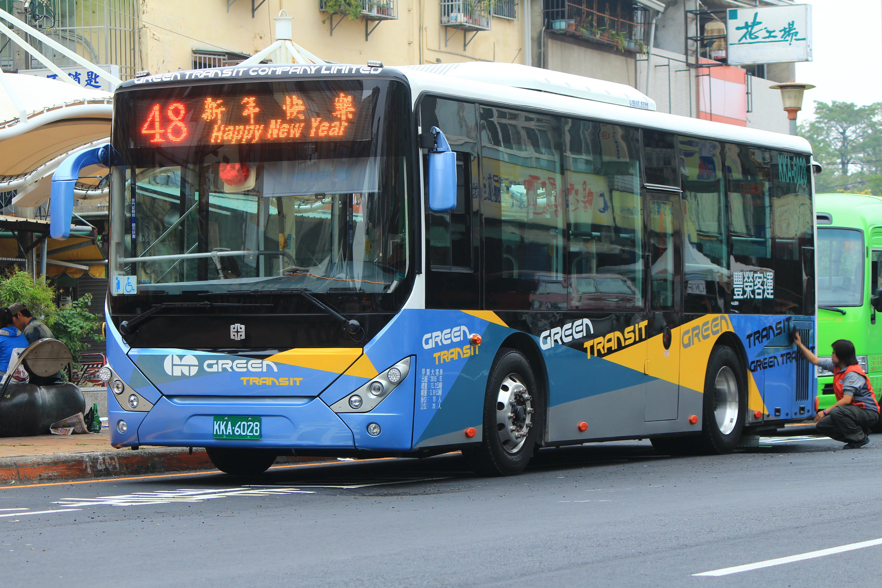 豐榮客運中通中巴